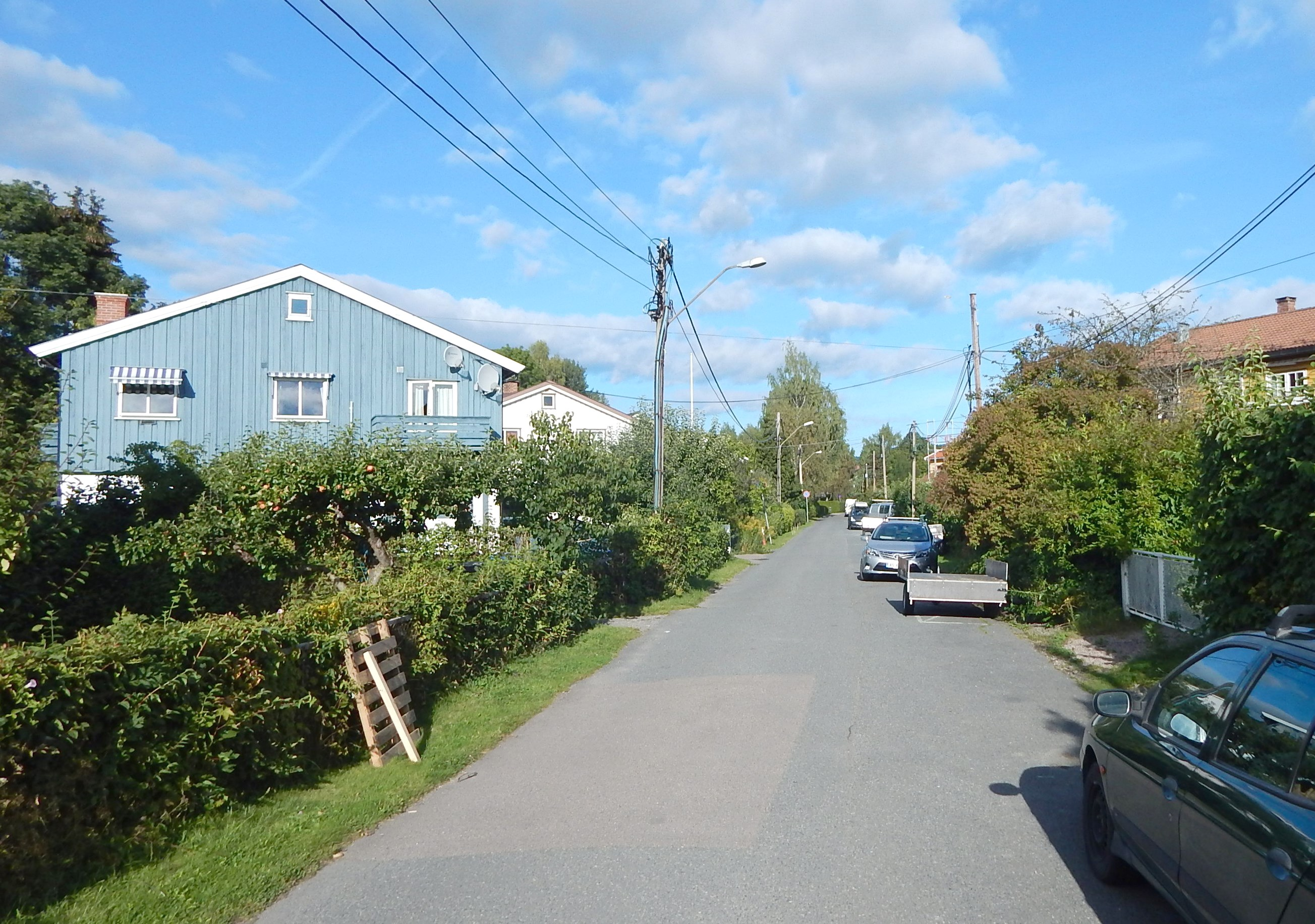 Bukken Bruses vei